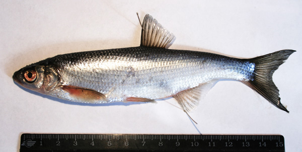 Селява азовська, Alburnus leobergi. Річка Деркул (басейн Дінця)